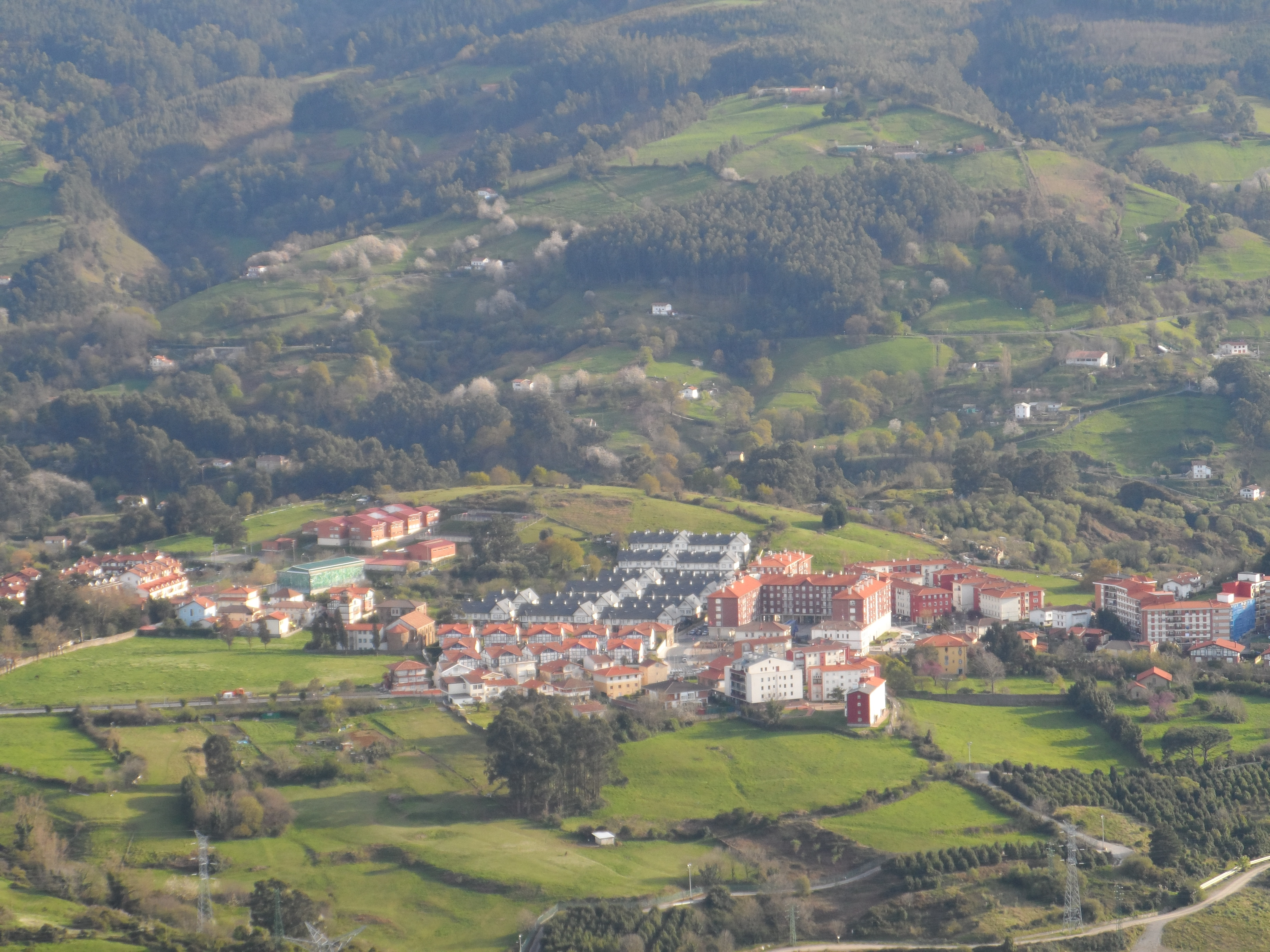 Las Carreraseko ikuspegi orokorra, Montañotik.